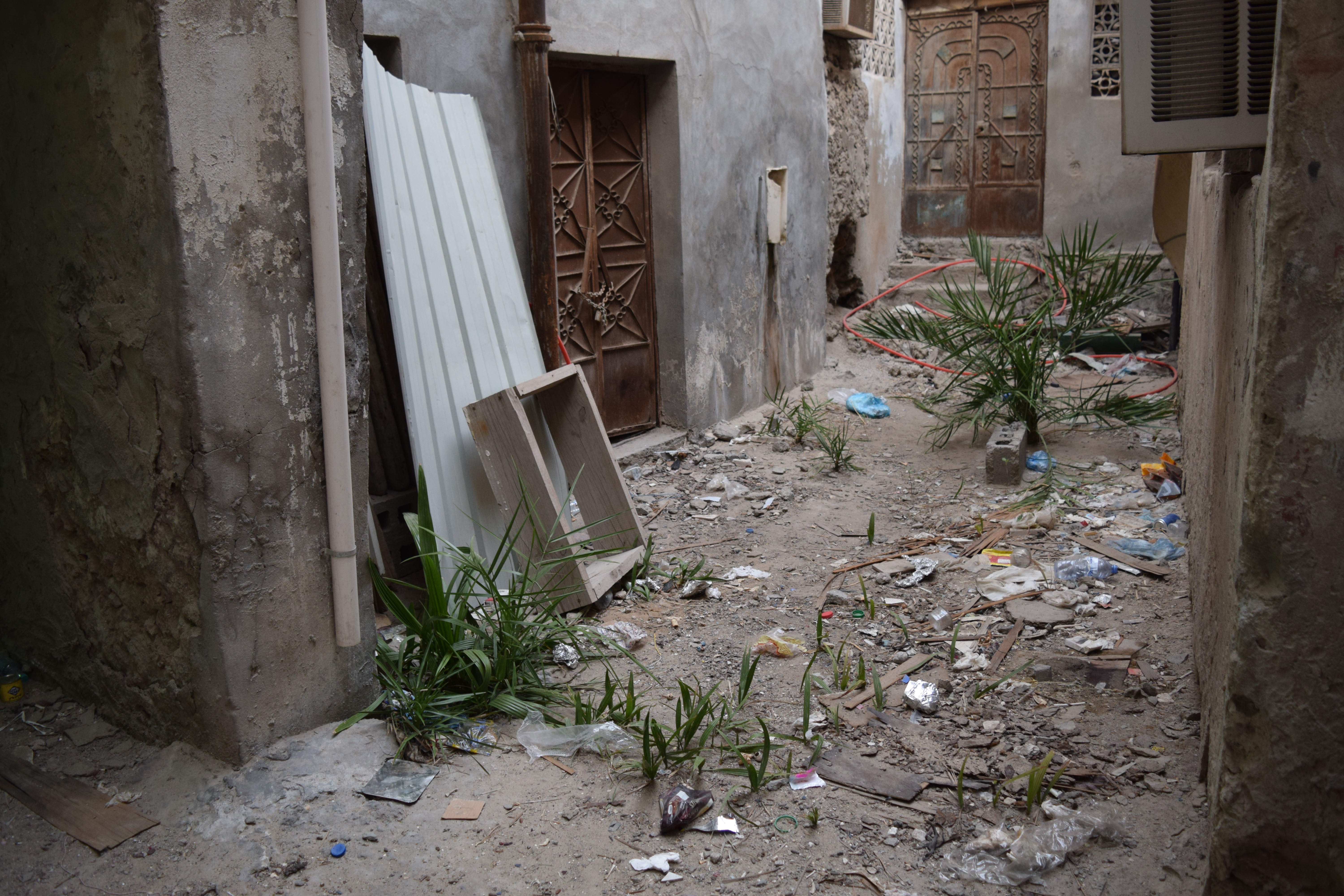 ساباط قديم في حي الزريب، تراكمت عليه الأوساخ، وبالرغم من ذلك فإن نُخيّلات نمت بسبب خصوبة تربة حي الزريب.